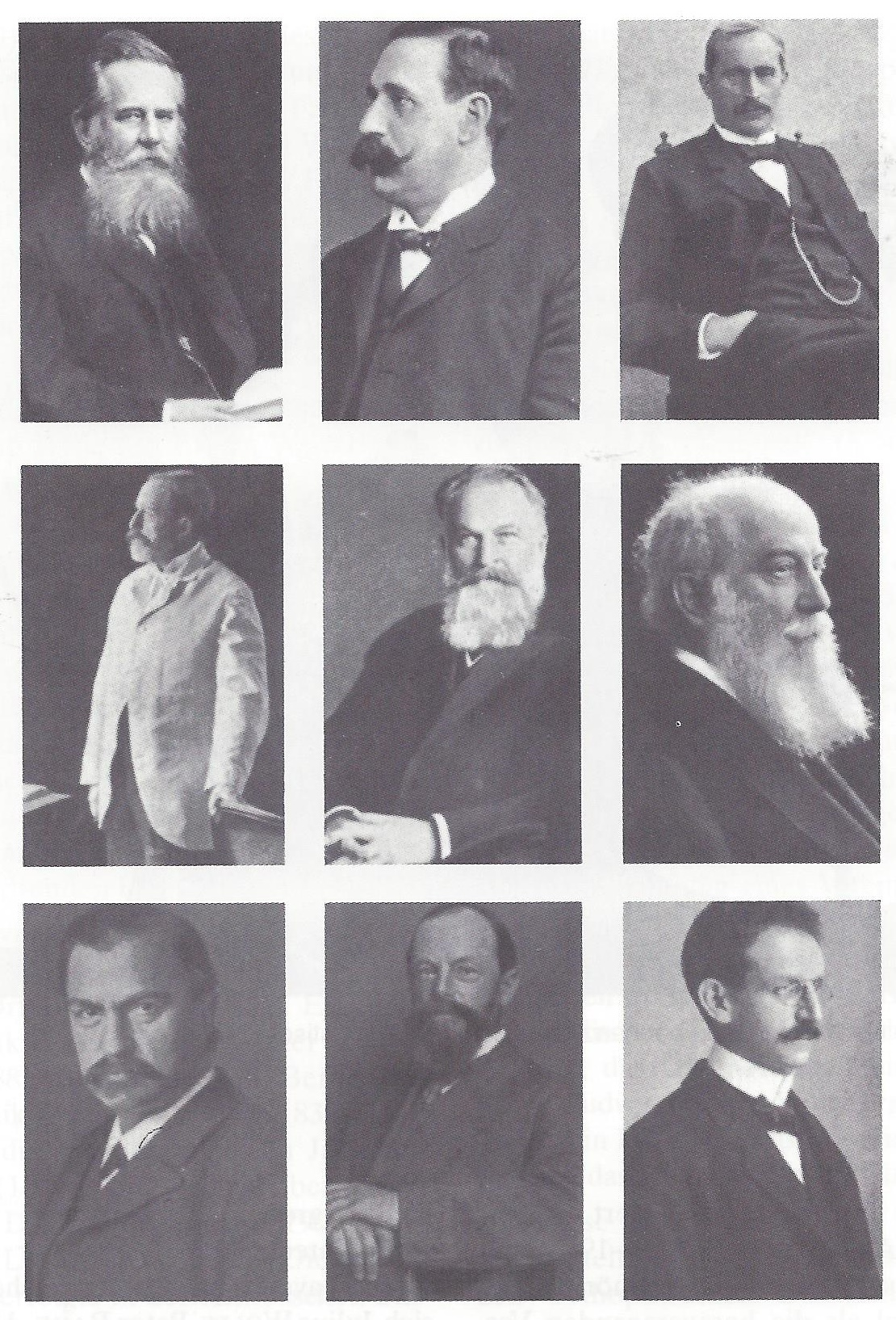 Die ersten 9 Präsidenten der Deutschen Gesellschaft für Orthopädische Chirurgie (l–r): Heinrich Hoeftman (1902), Albert Hoffa (1903), Ludwig Heusner (1904), Johann von Mikulicz (1905), Adolf Lorenz (1906), Bernhard Bardenheuer (1907), Wilhelm Schulthess (1908), Fritz Lange (1909), Georg Joachimsthal (1910).